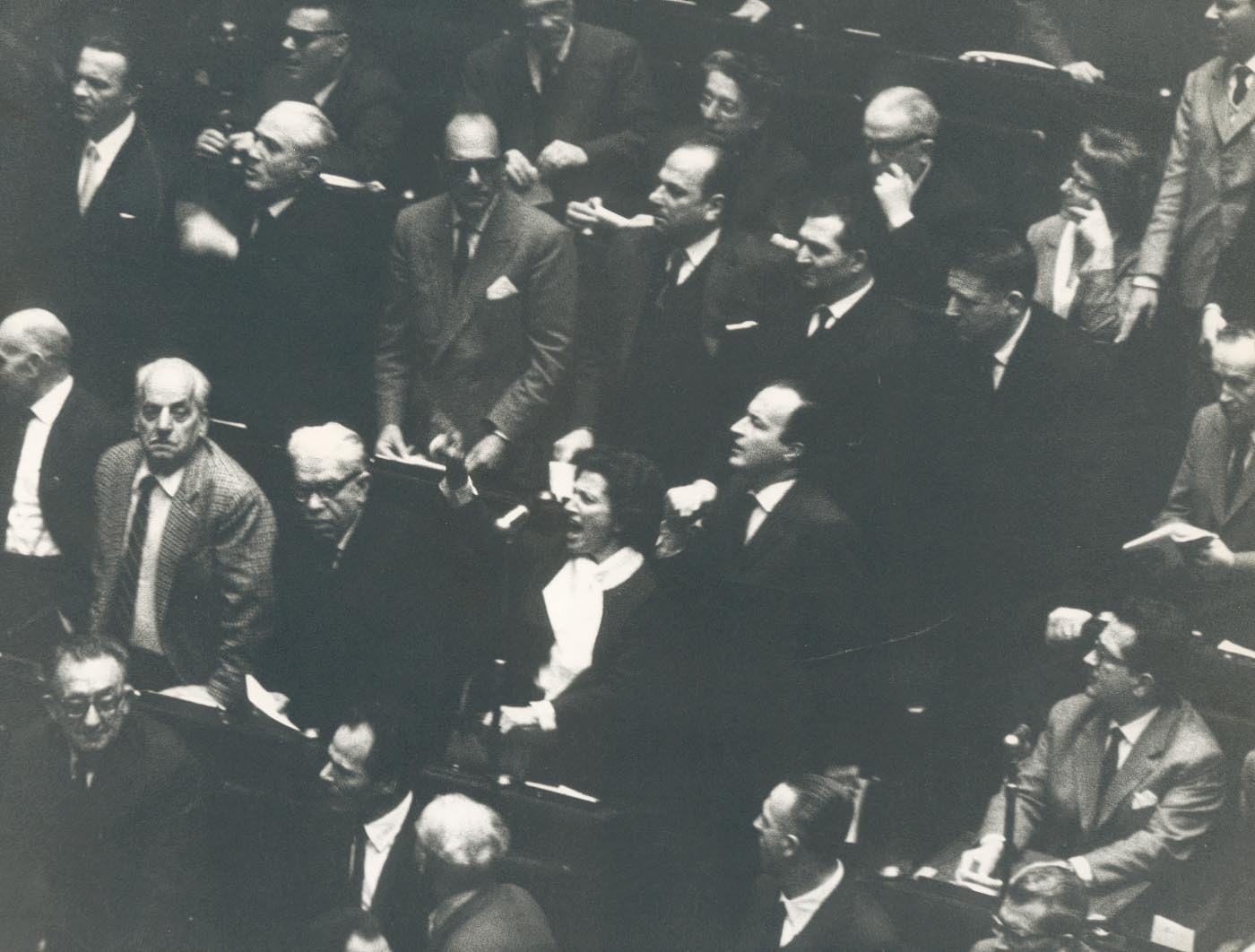 Lucina Viviani Viviani interviene alla Camera dei Deputati nel 1946 contro il Patto Atlantico